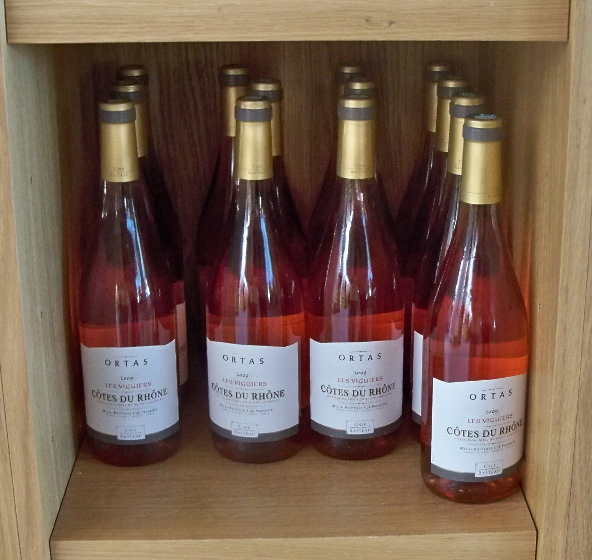 Bouteilles de Côtes du Rhône rosé de Rasteau, Vaucluse, France